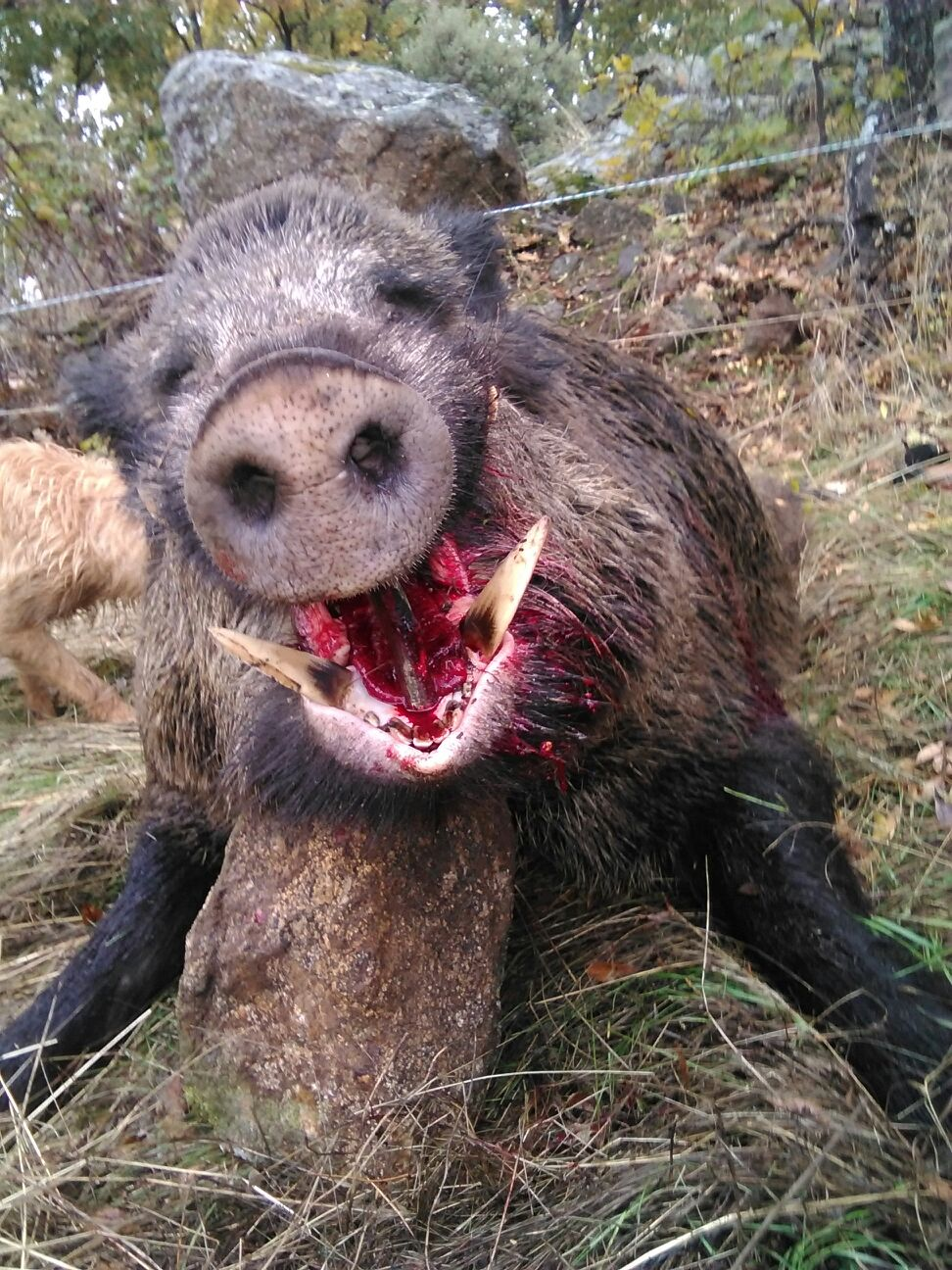 Jabalí abatido en Navaescurial (Sierra de Villafranca (Ávila)